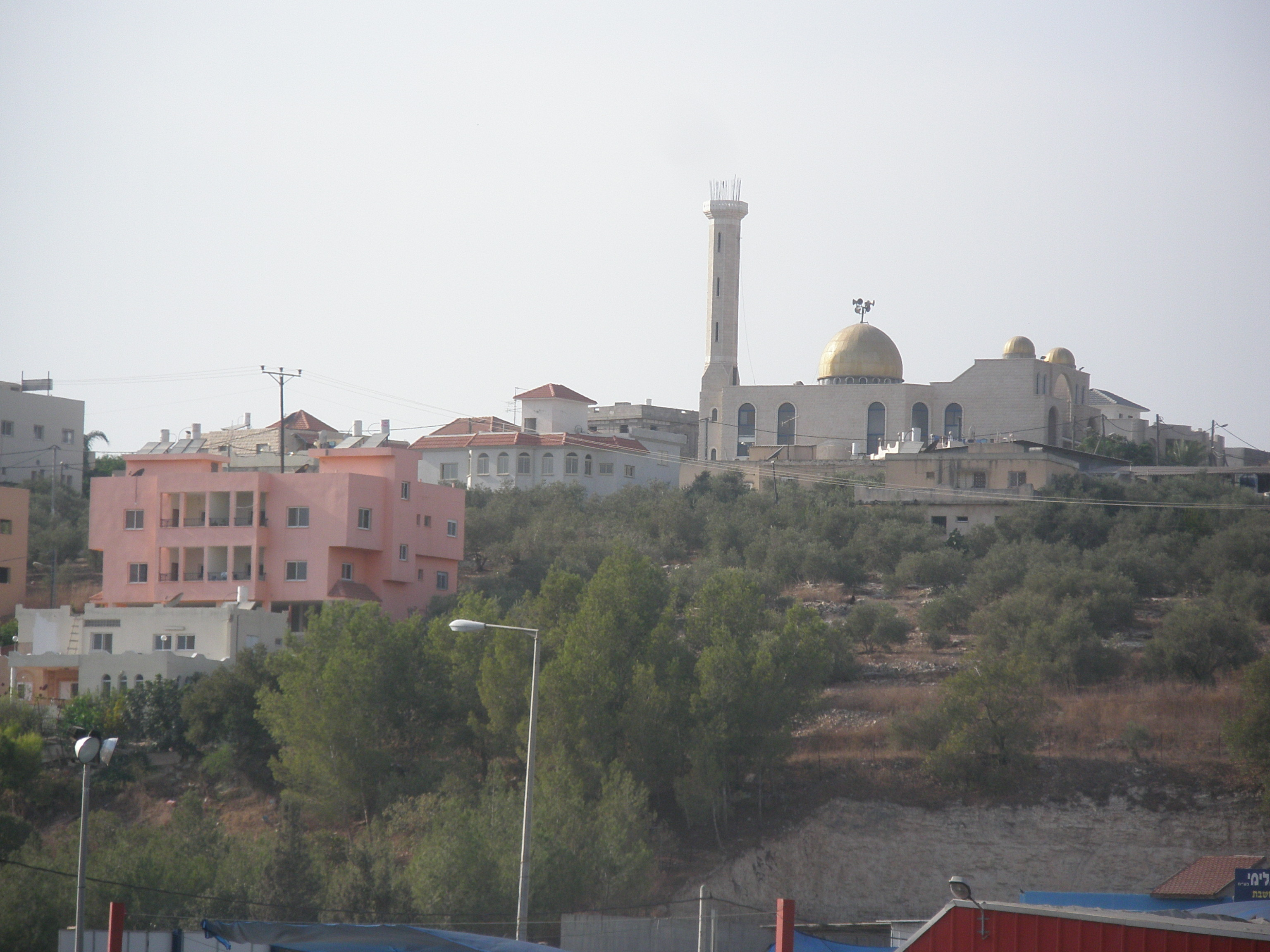 Kafr Qara, Israel